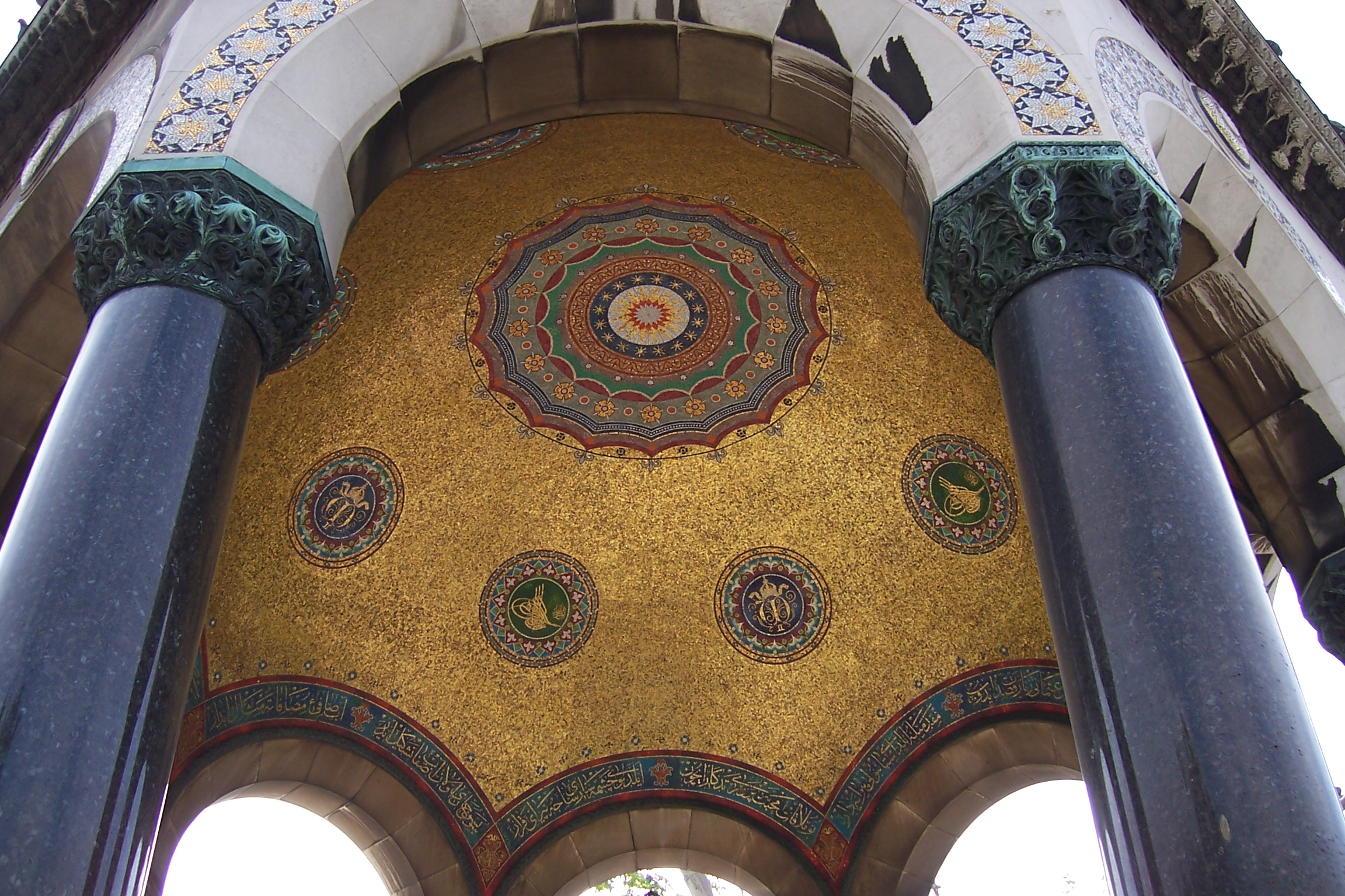 Alman Çeşmesi, Sultanahmet, Istanbul, Turkey.